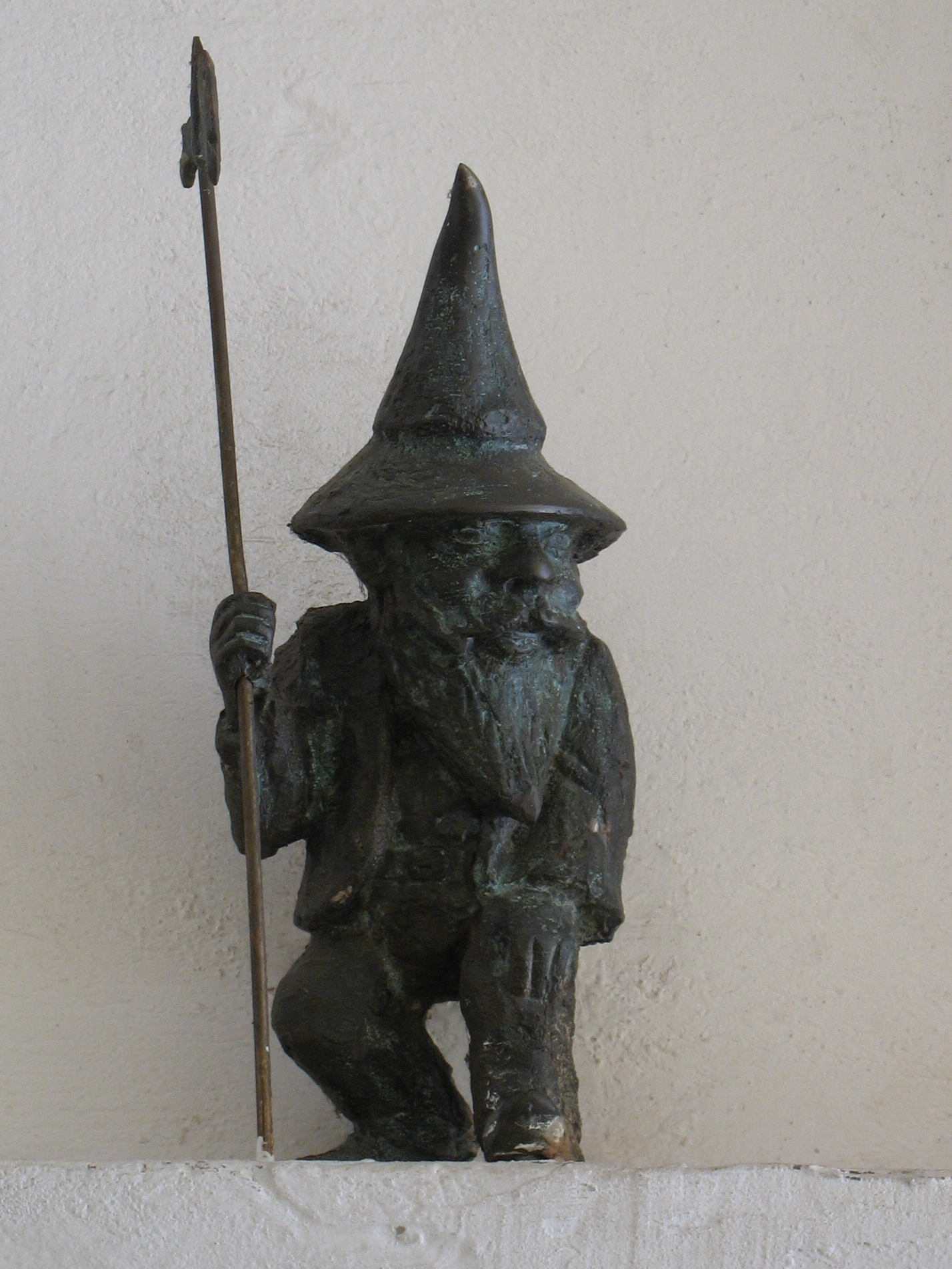 Halabardnik vel Strażnik Pałabała - wrocławski krasnal. Wrocław, Sukiennice 12, nad wejściem do siedziby Straży Miejskiej.